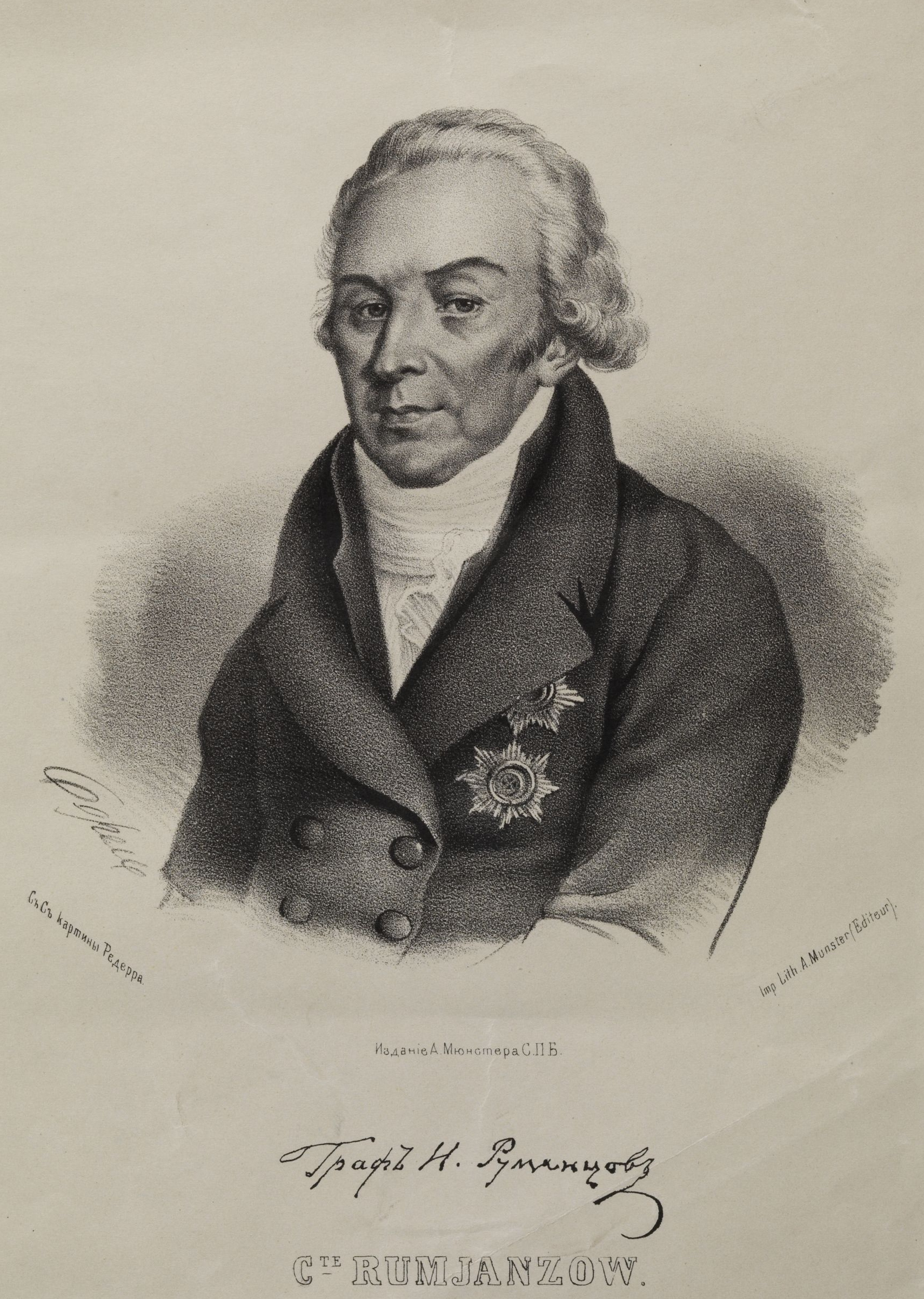 Румянцев Н. П.